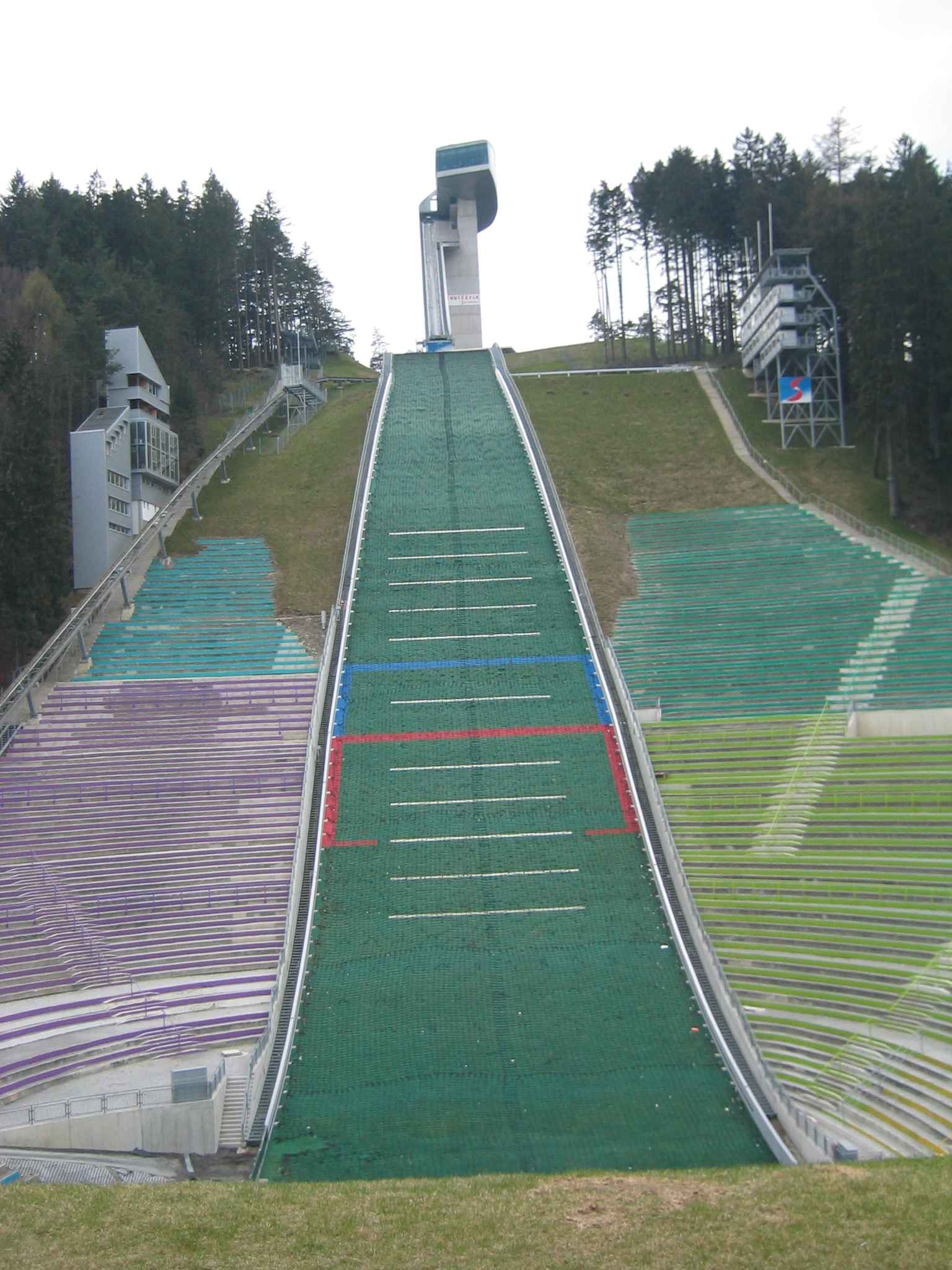 Front-Ansicht der Bergiselschanze